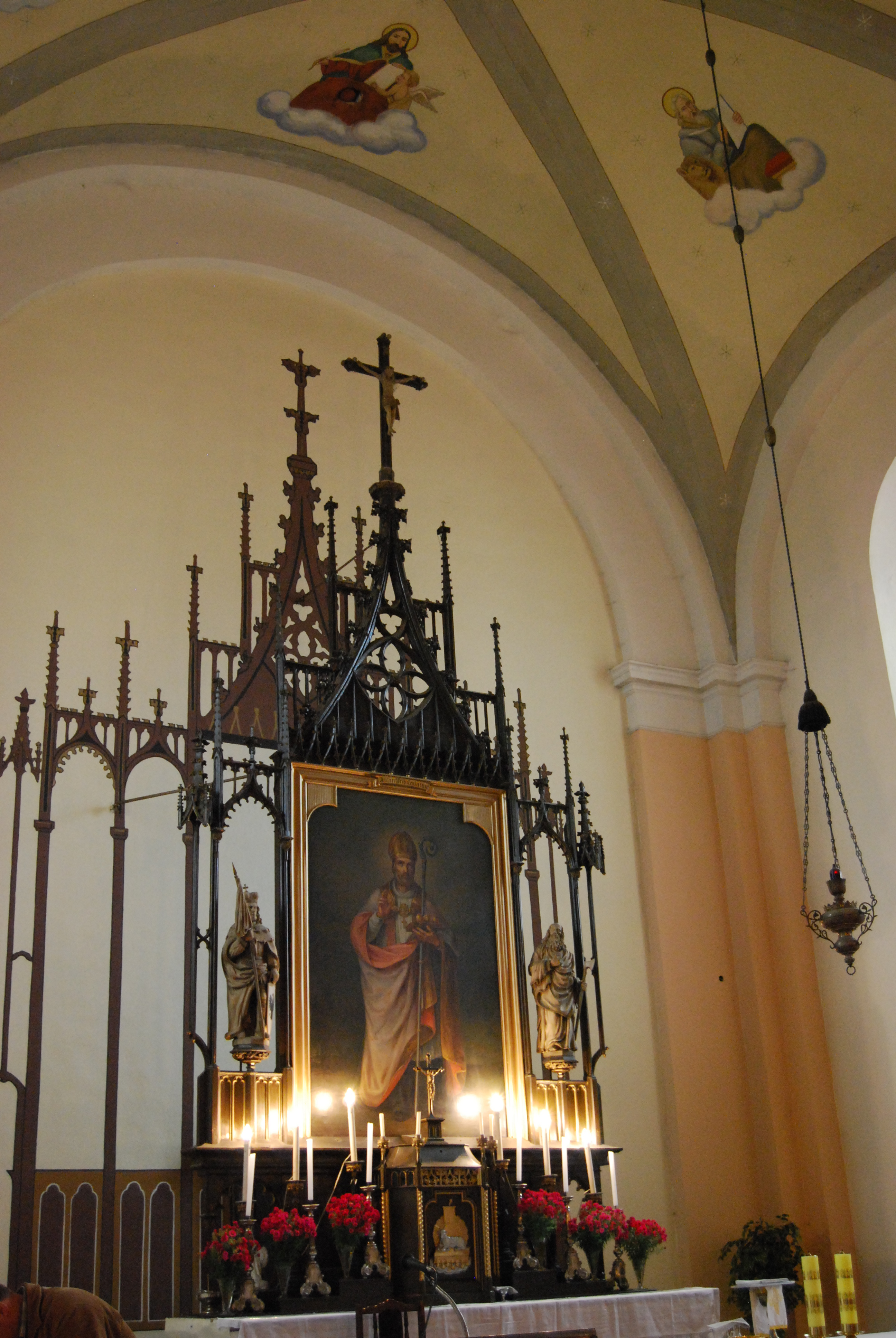 Kostel svatého Mikuláše. Interiér kostela. Hlavní oltář. Krásná Hora nad Vltavou v okrese Příbram. Česká republika. Object location49° 36′ 14.99″ N, 14° 16′ 29.67″ E